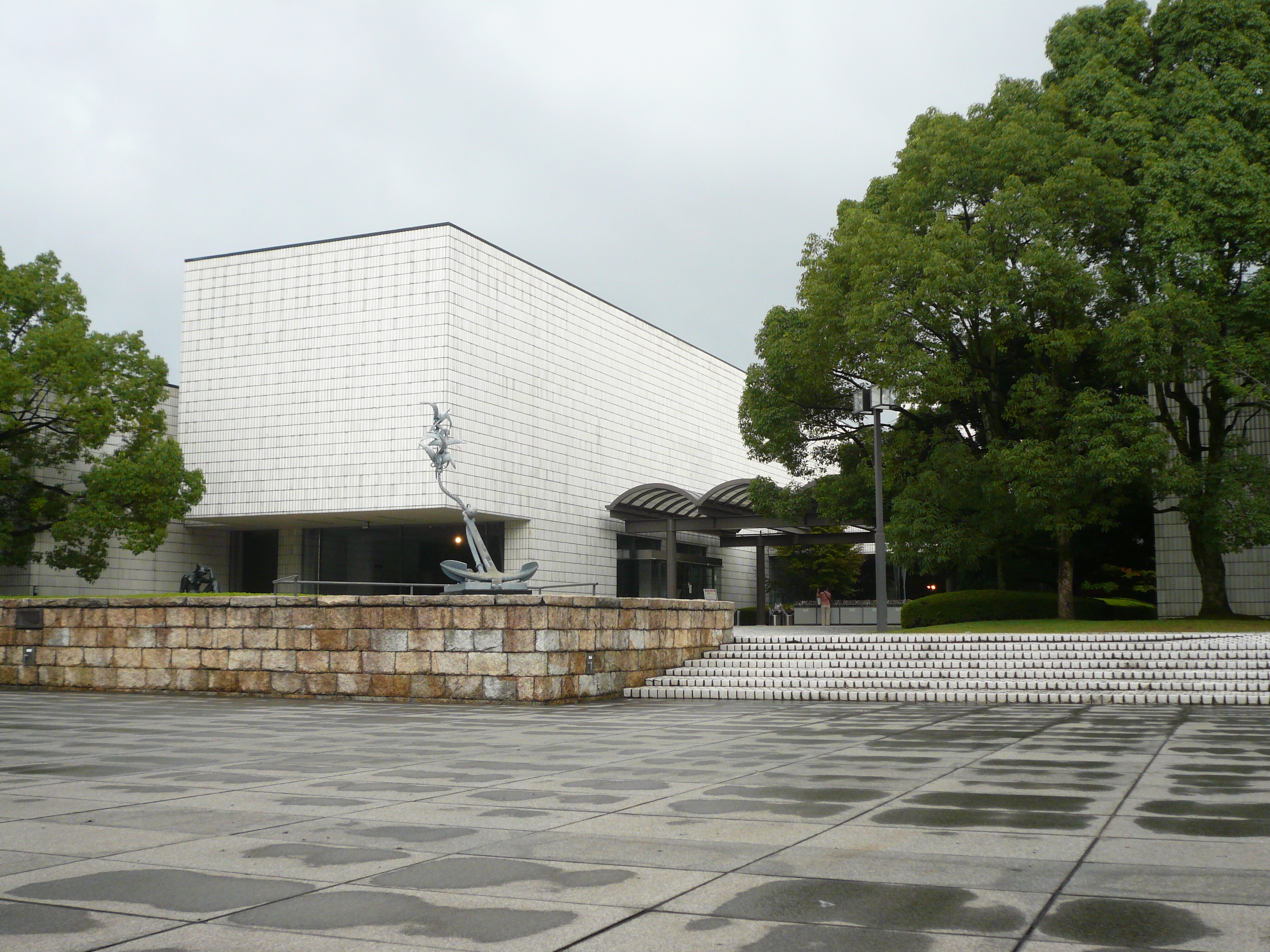 THE MUSEUM OF FINE ARTS,GIFU（岐阜県美術館）,Gifu,Gifu,Japan（岐阜県岐阜市）で撮影。外観。